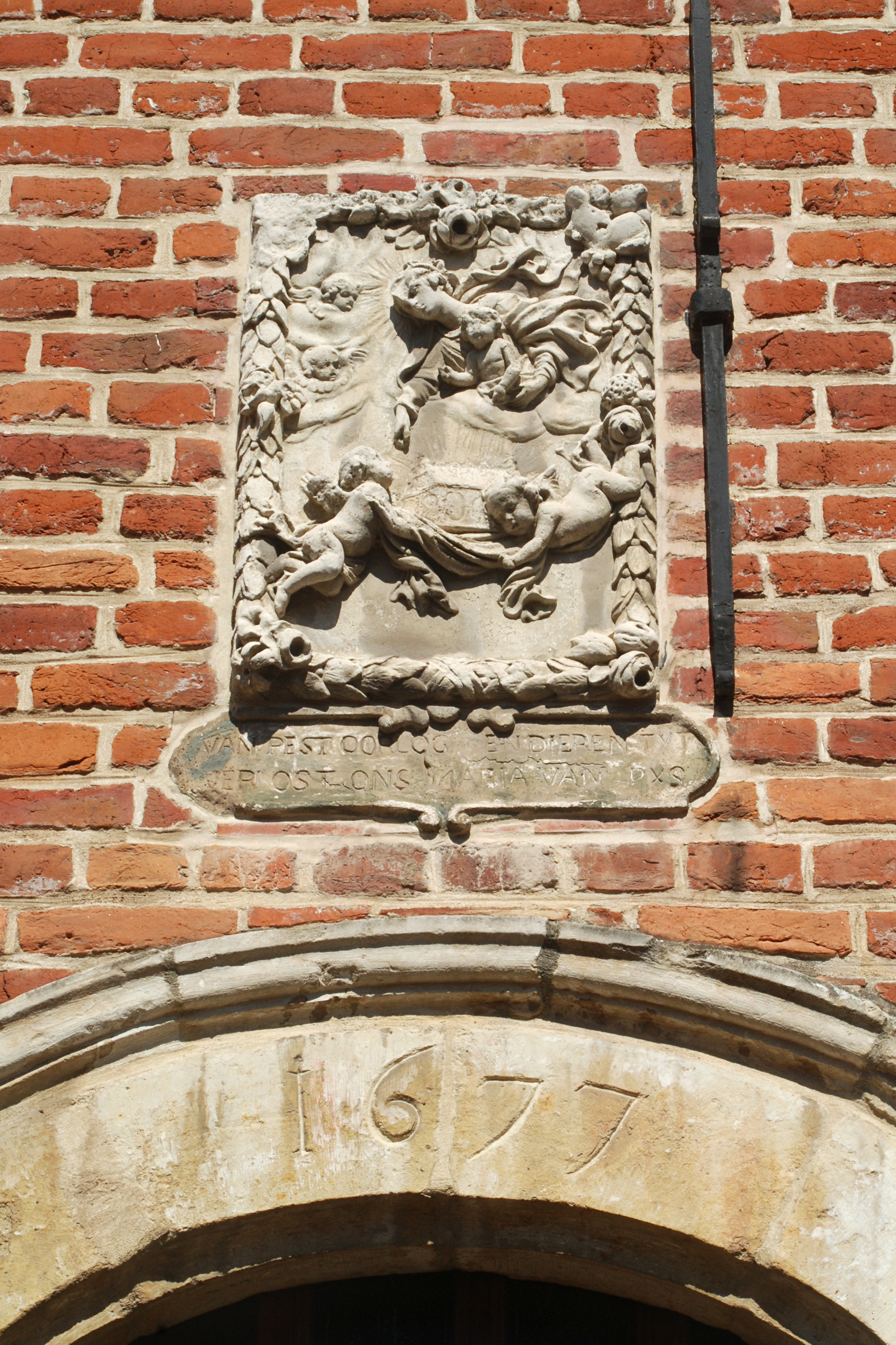 Belgium - Leuven - Groot Begijnhof - Klein Straatken n°69